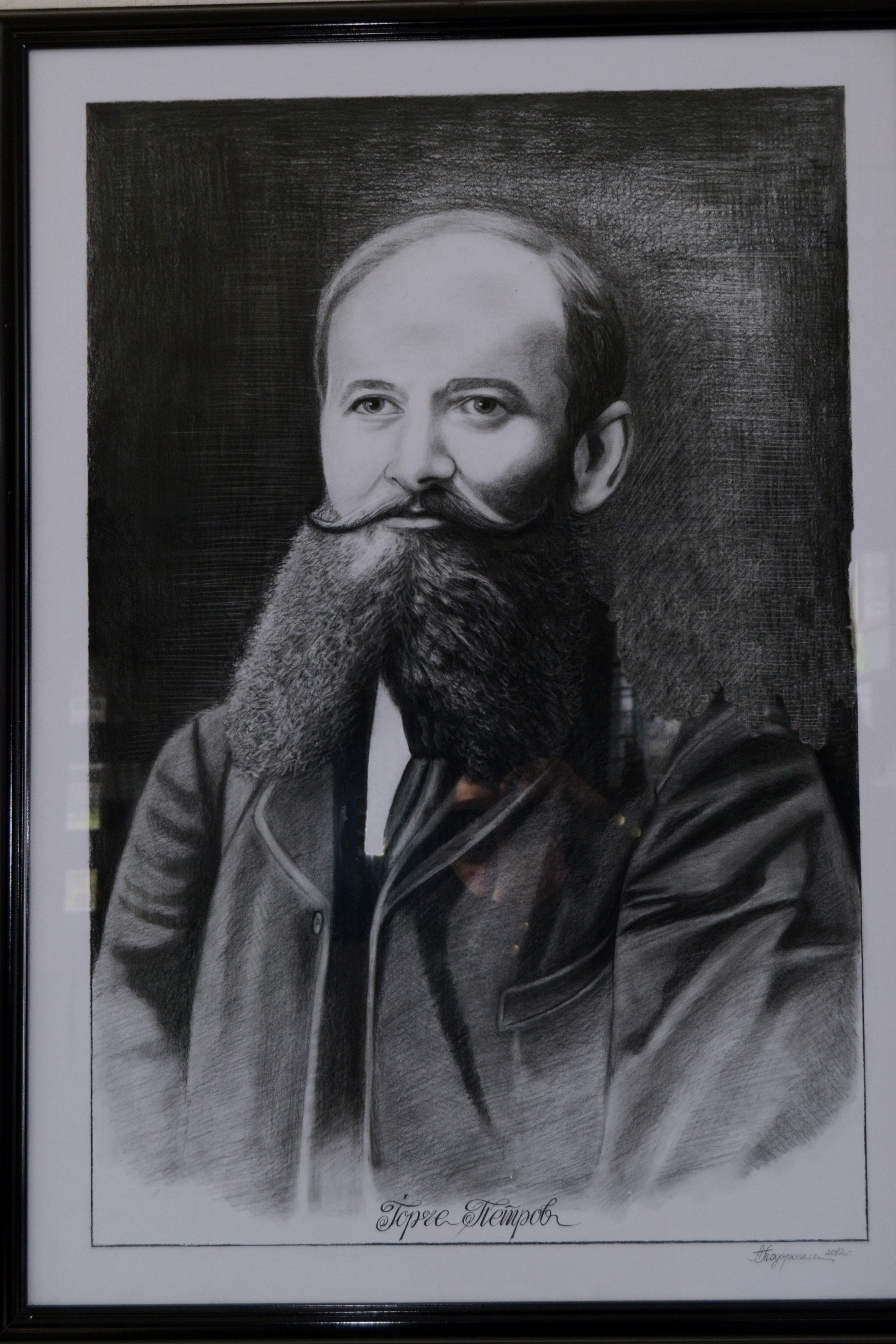 Ѓорче Петров